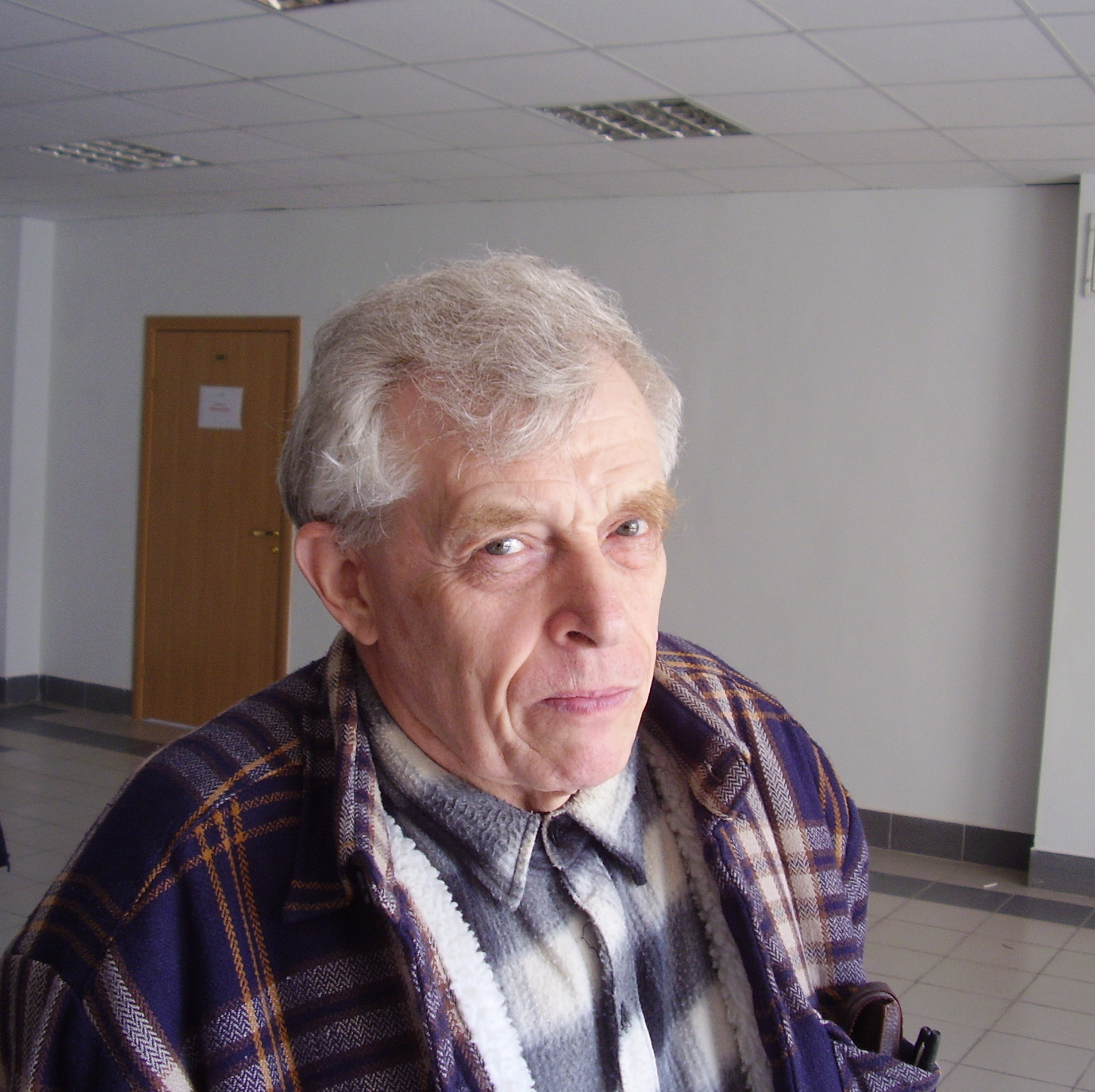 Симоненко Игорь Борисович в 2006 году в коридоре мехмата ЮФУ.